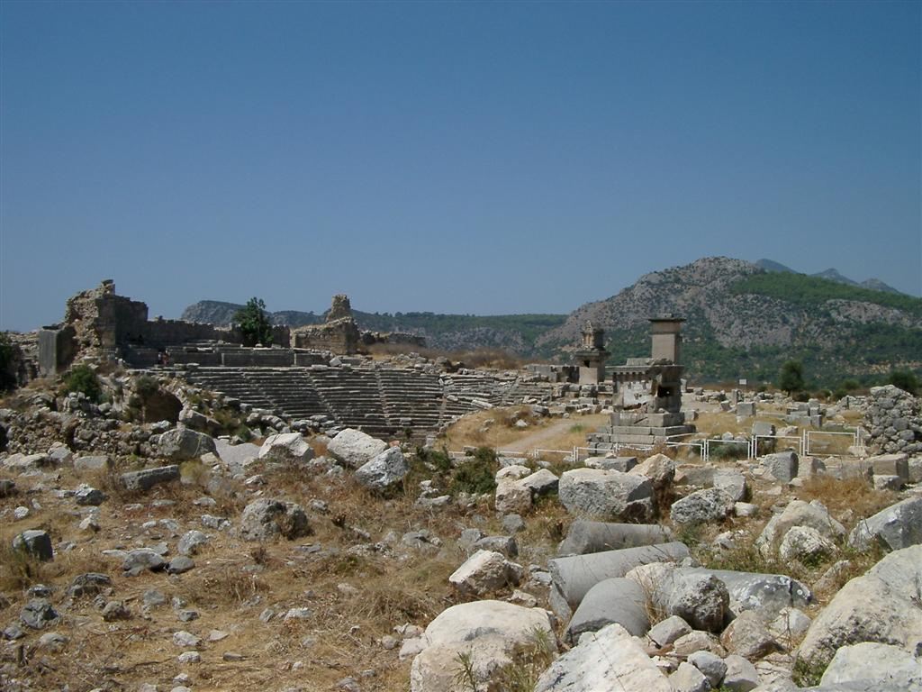 Ruins of Xanthus, Turkey Ruinenstadt von Xanthos, Türkei